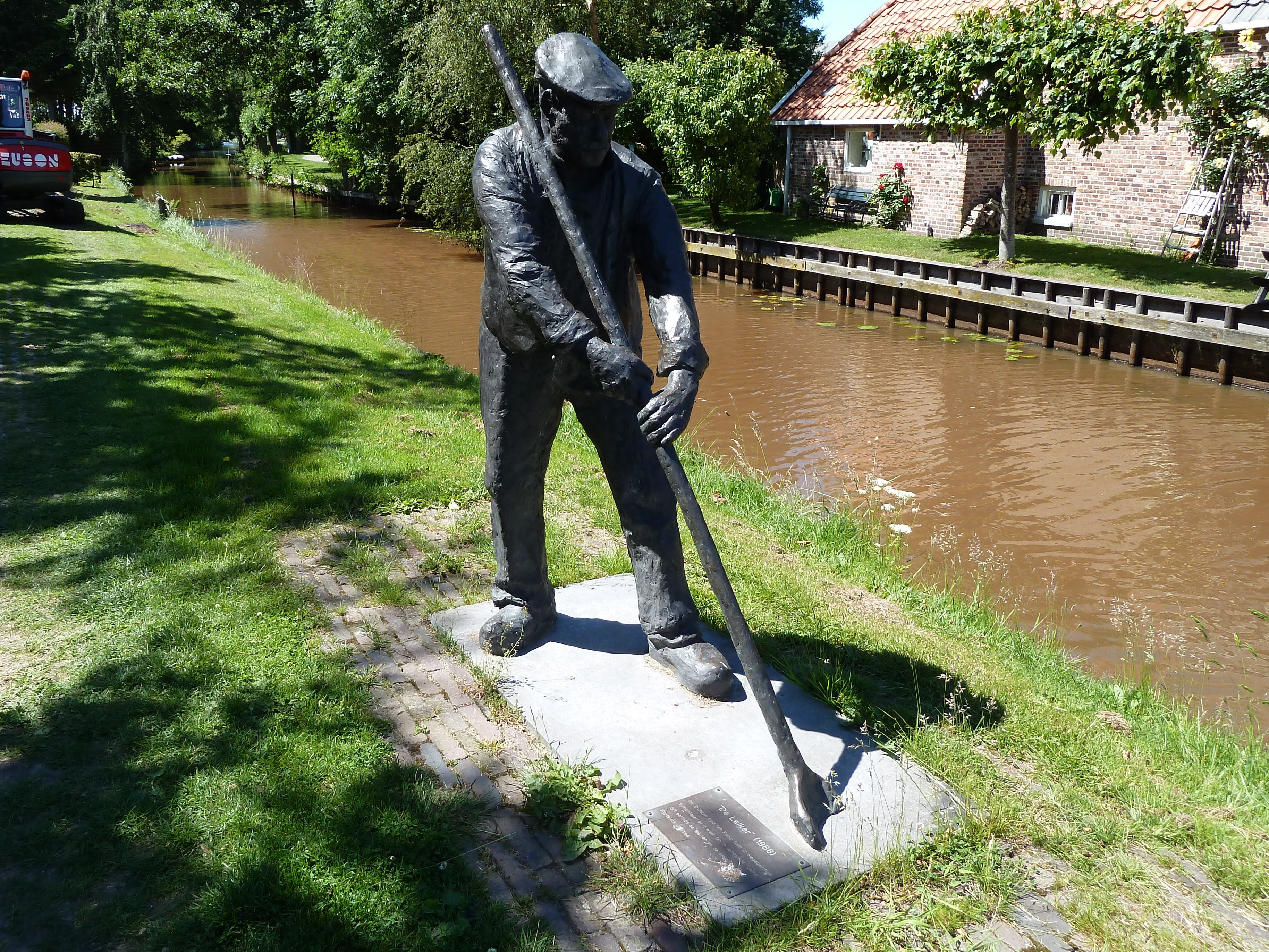 Beeld De Leiker in het Friese dorp Rijperkerk (Ryptsjerk). In 1986 gemaakt door Frans Ram uit Hogebeintum. Het beeld symboliseert het werk van de 'leiker'; een baggeraar die 'klyn' (veen) baggerde van de bodems van de vaarten rondom Rijperkerk.